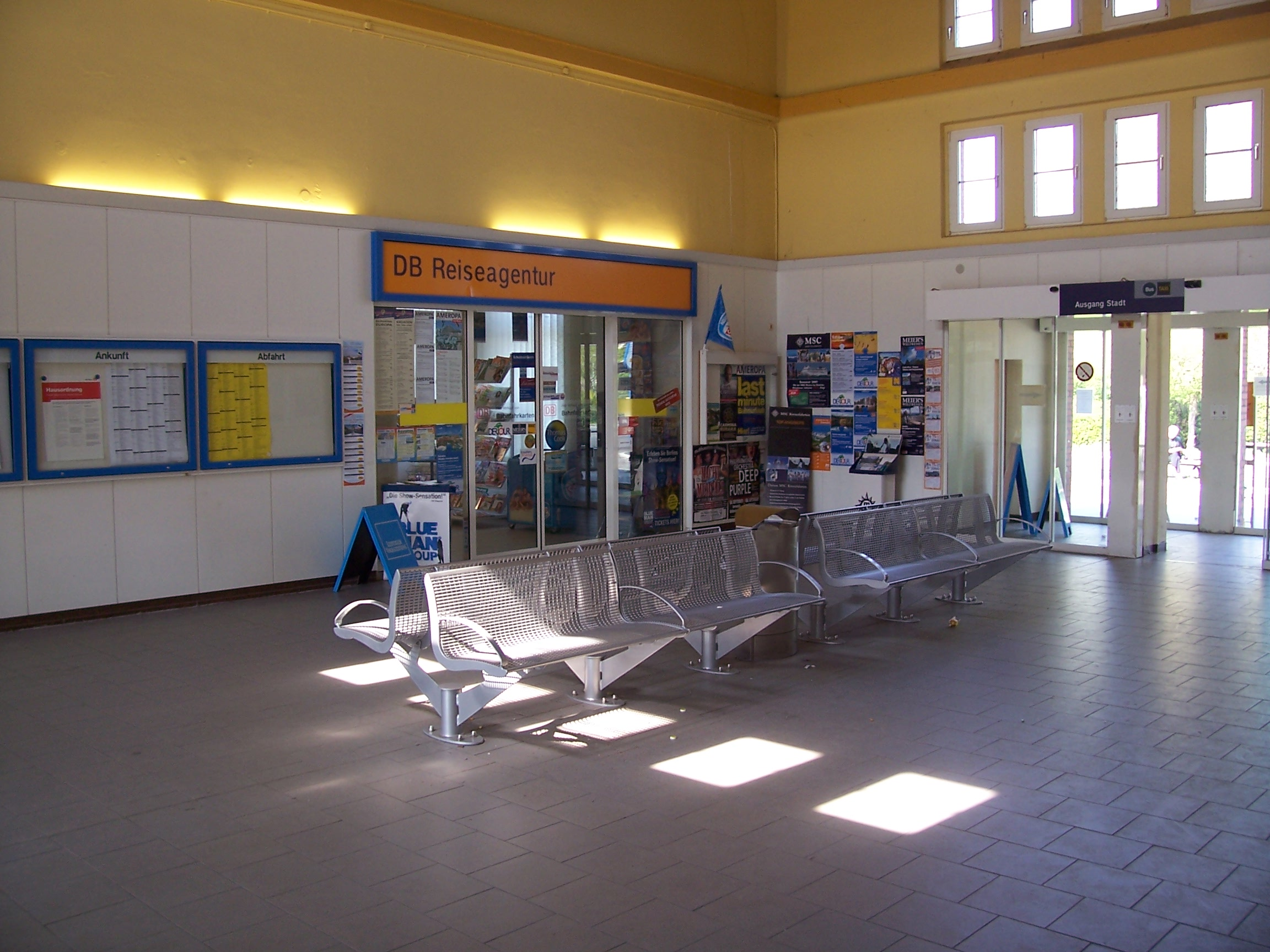 Wartesaal im Empfangsgebäude des Bahnhofs Eilenburg